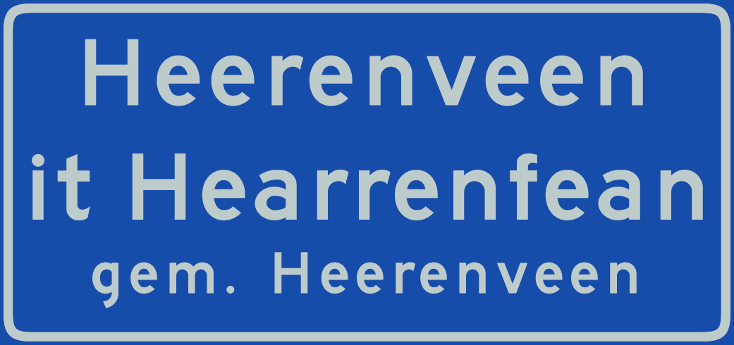 Tweetalig bebouwde kom bord Heerenveen